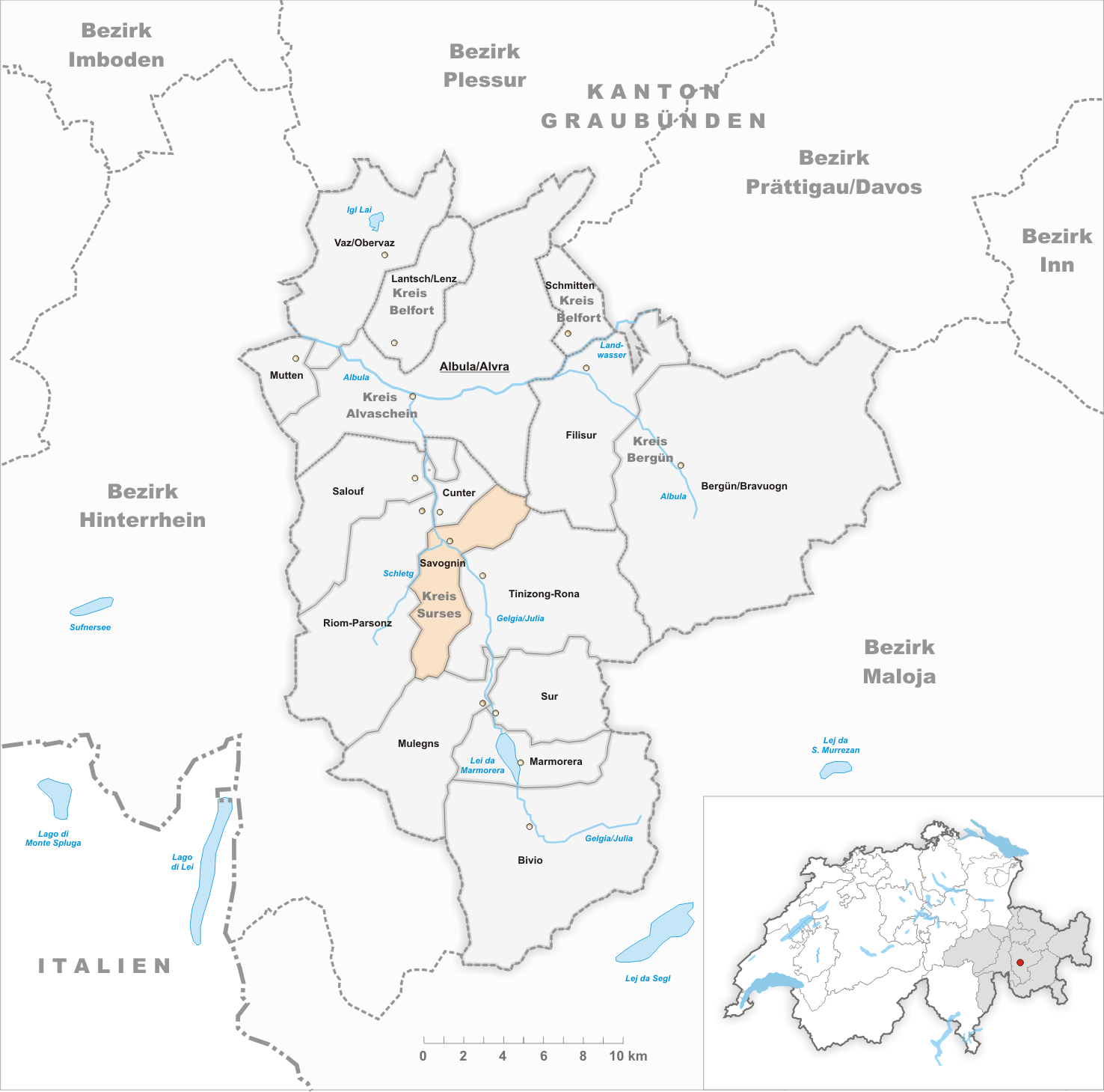 Municipality Savognin